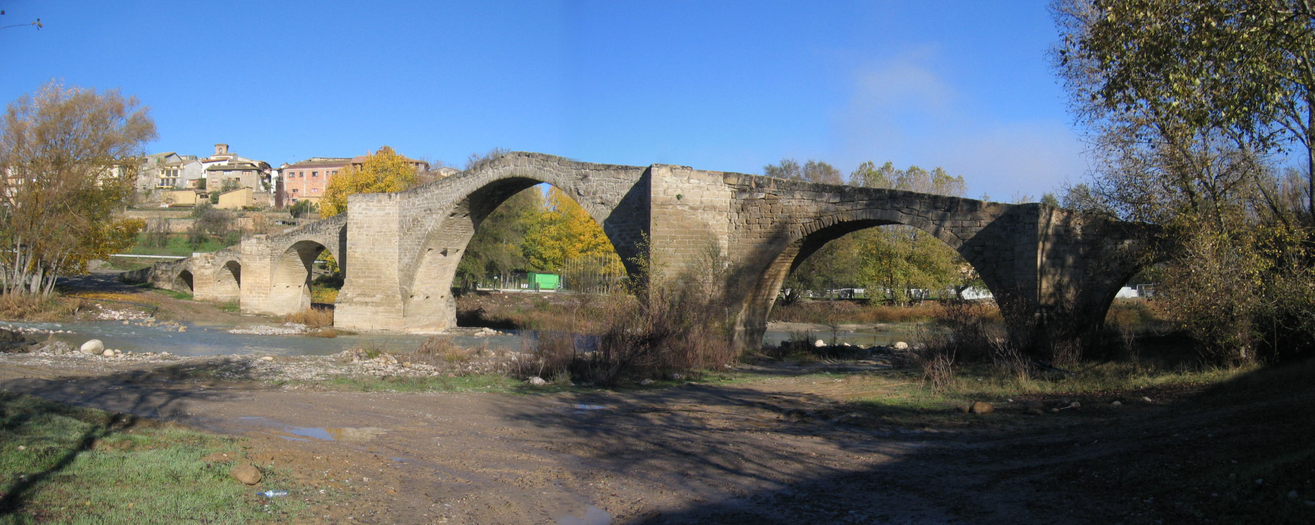 Puente del s.XIII que permite cruzar el río Isábena. Es del tipo “lomo de asno”, de notable longitud y gran altura en su ojo central, flanqueado a ambos lados por una teoría de réplicas del mismo, cada vez de menor vuelo, llegando a quedar bajo el nivel de algunos campos de cultivo próximos. Tajamares angulados aguas arriba y aguas abajo, completan su elegante silueta. Más de cien metros de longitud que permiten el paseo sobre su estructura. La plataforma de unos dos metros y medio, se ensancha en apartaderos a nivel de los respectivos machones. Los arcos que componen la estructura son de medio punto, con impostas en el arranque y descargando sus empujes en los machones prismáticos de sección hexagonal situado entre ellos. Entorno